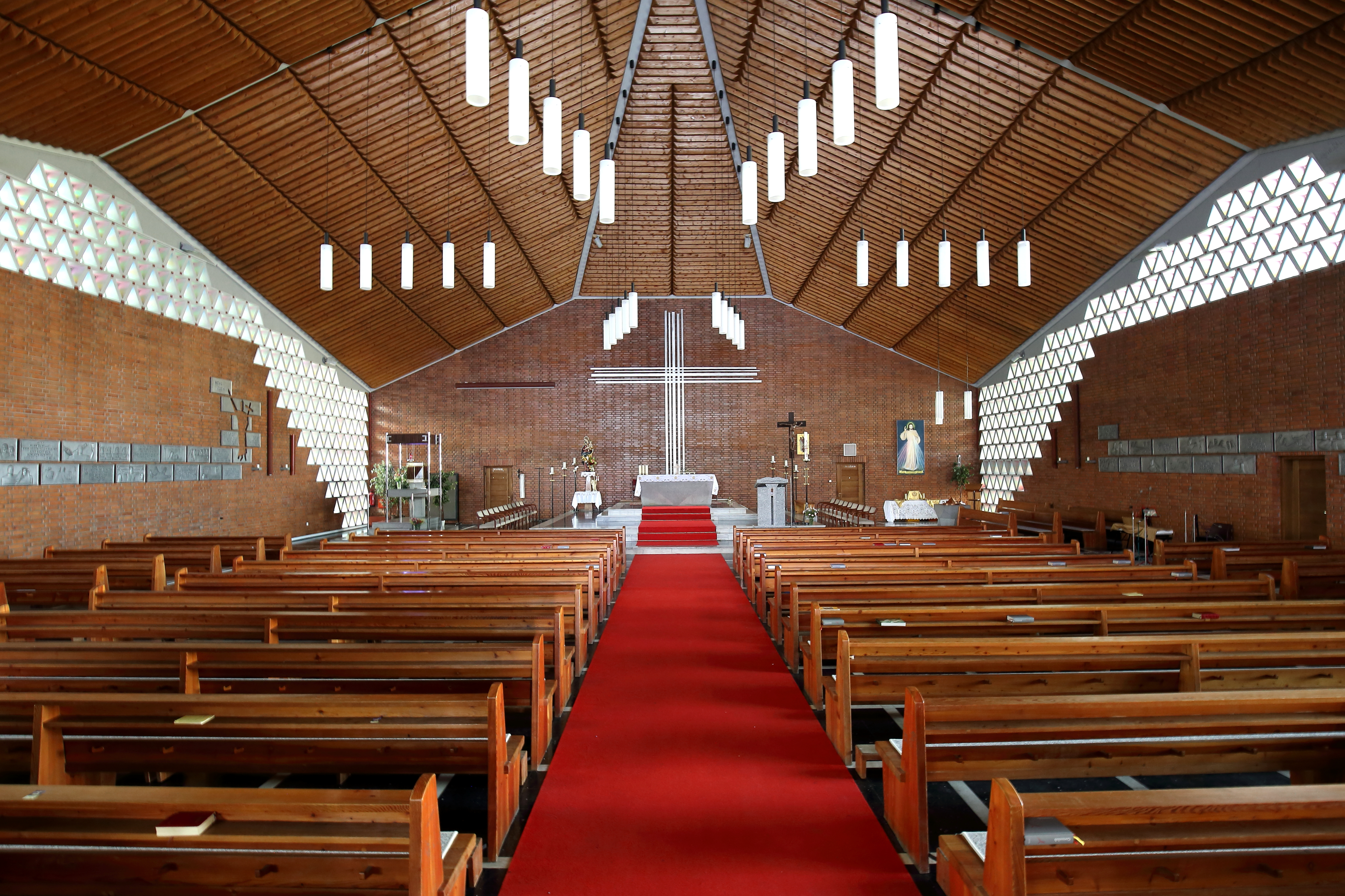 Innenansicht der von 1962 bis 1964 nach Plänen des Architekten Alfons Leitl errichtete Pfarrkiche Blut Christi in Jedlesee, ein Ortsteil im 21. Wiener Gemeindebezirk Floridsdorf.